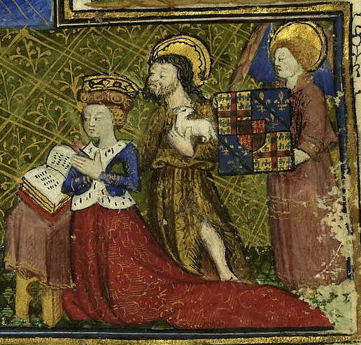 Représentation de Françoise de Dinan dans son livre d'heures.